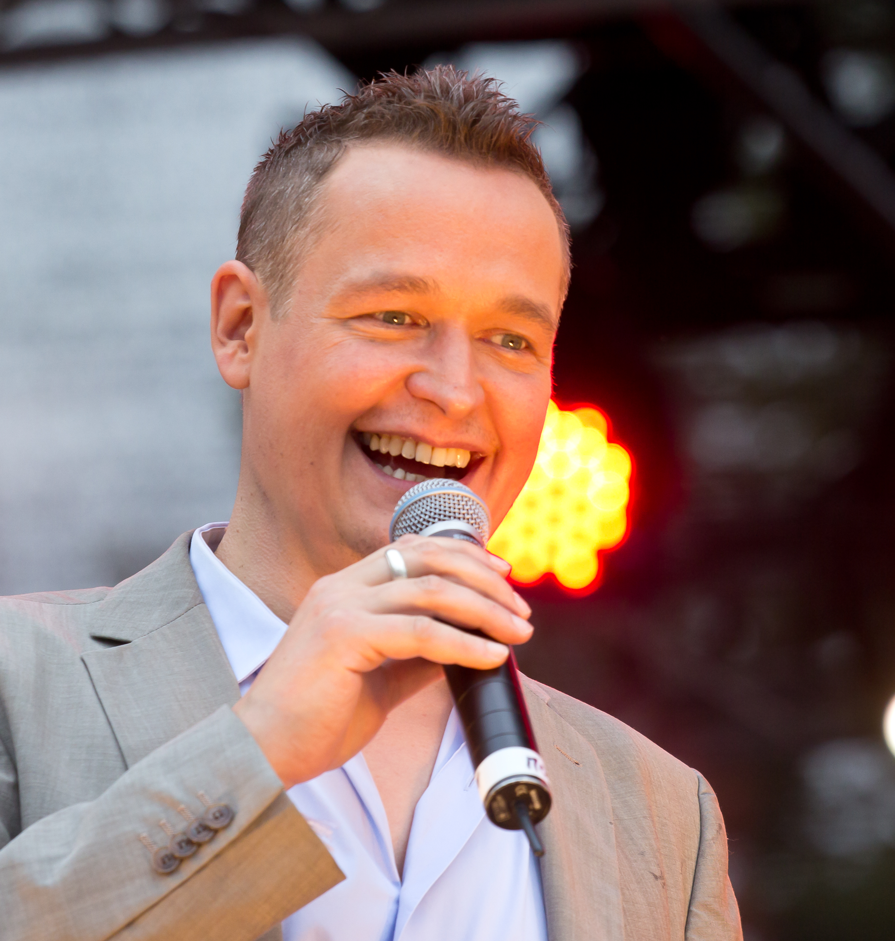 ColognePride 2014 - Heumarkt - Moderator Bernd Fuchs